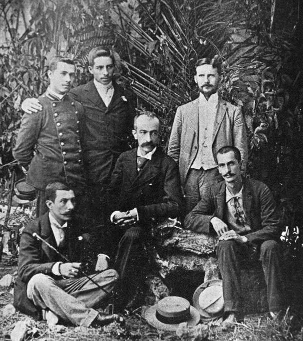 Comisión de ingenieros para la demarcación de límites con México.